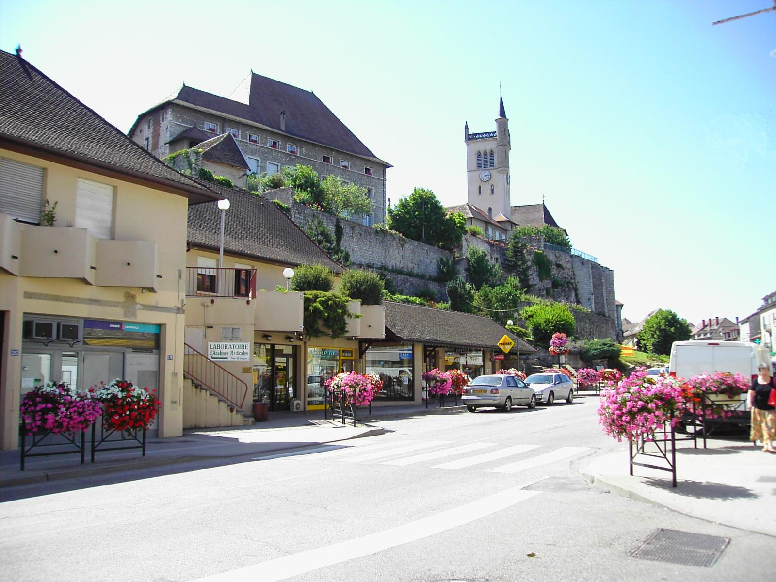 Morestel - Isère